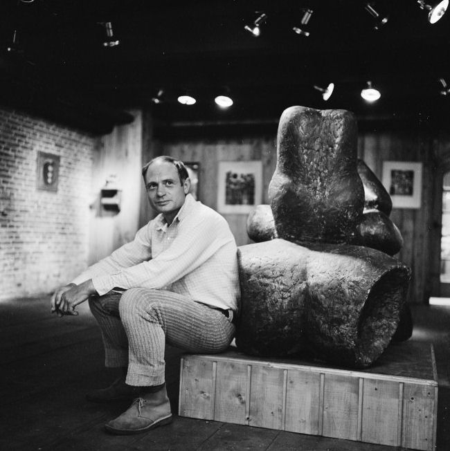 Beeldhouwer Gerard Bruning in de kunstgalerie van Douglas J. Cooper "Gallery Emeritus voor jonge en talentvolle artiesten" te Amsterdam